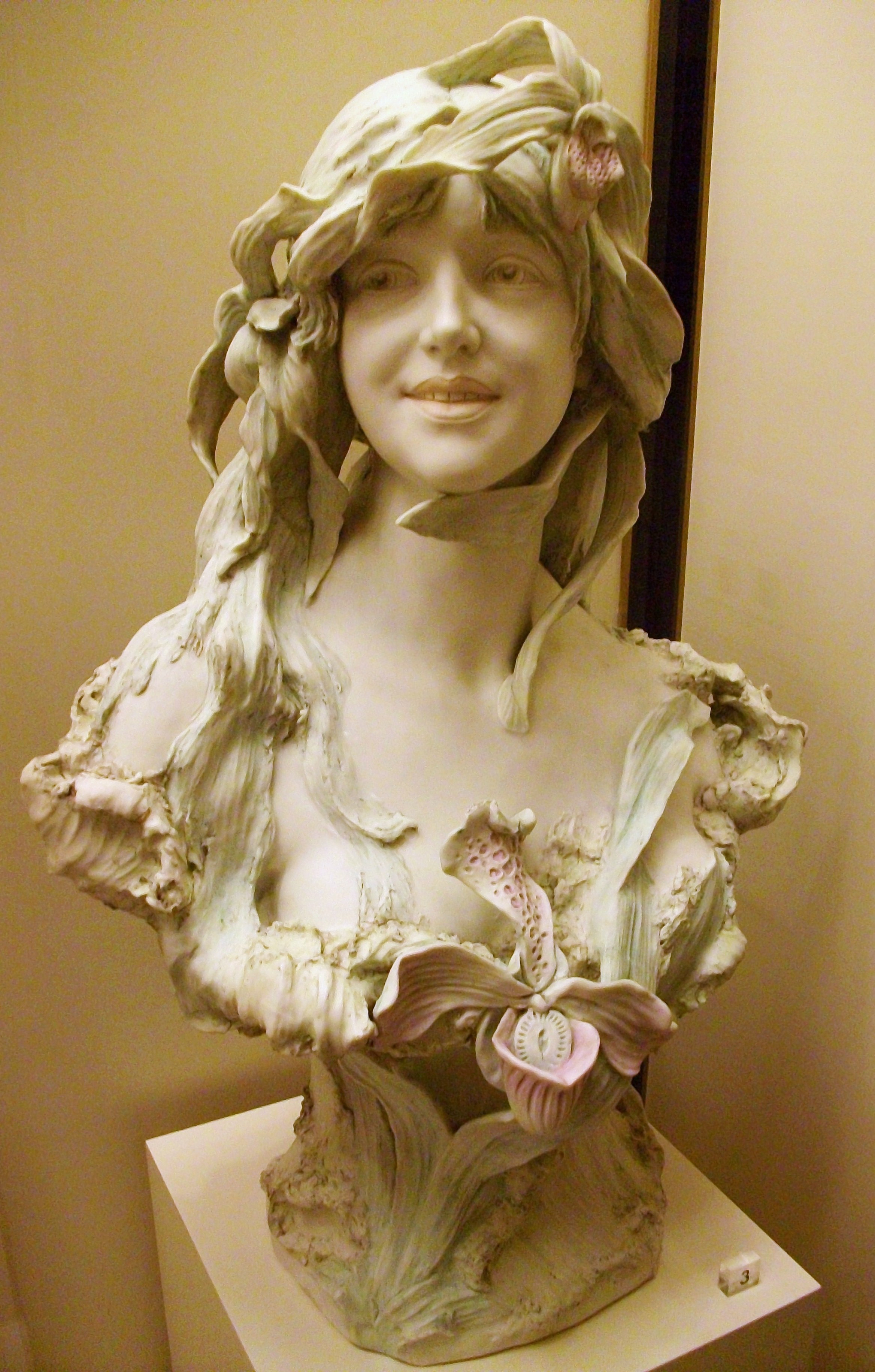 Bust femení, Bohèmia, segle XX, fàbrica del Royal Dux. Museu Nacional de Ceràmica de València.